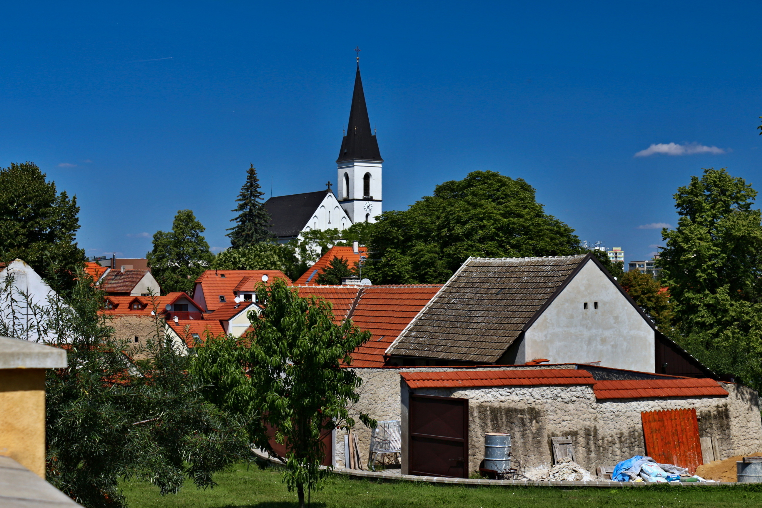 Praha 5-Stodůlky